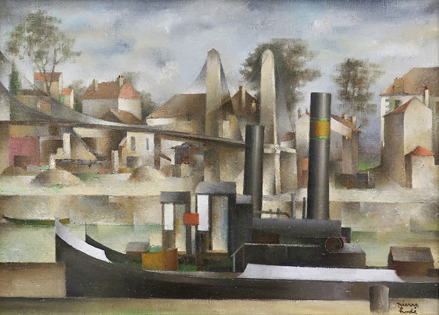 cubisme